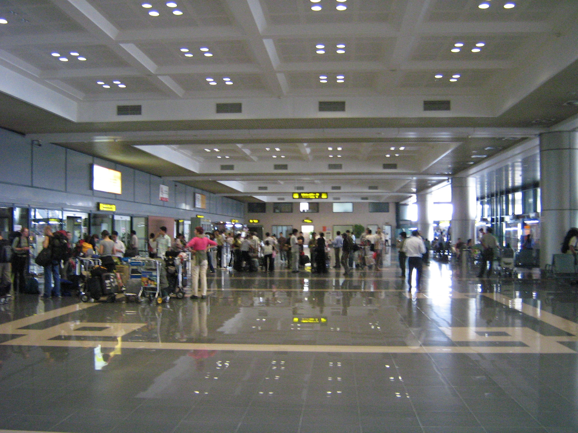 Ankunftshalle in Noibai